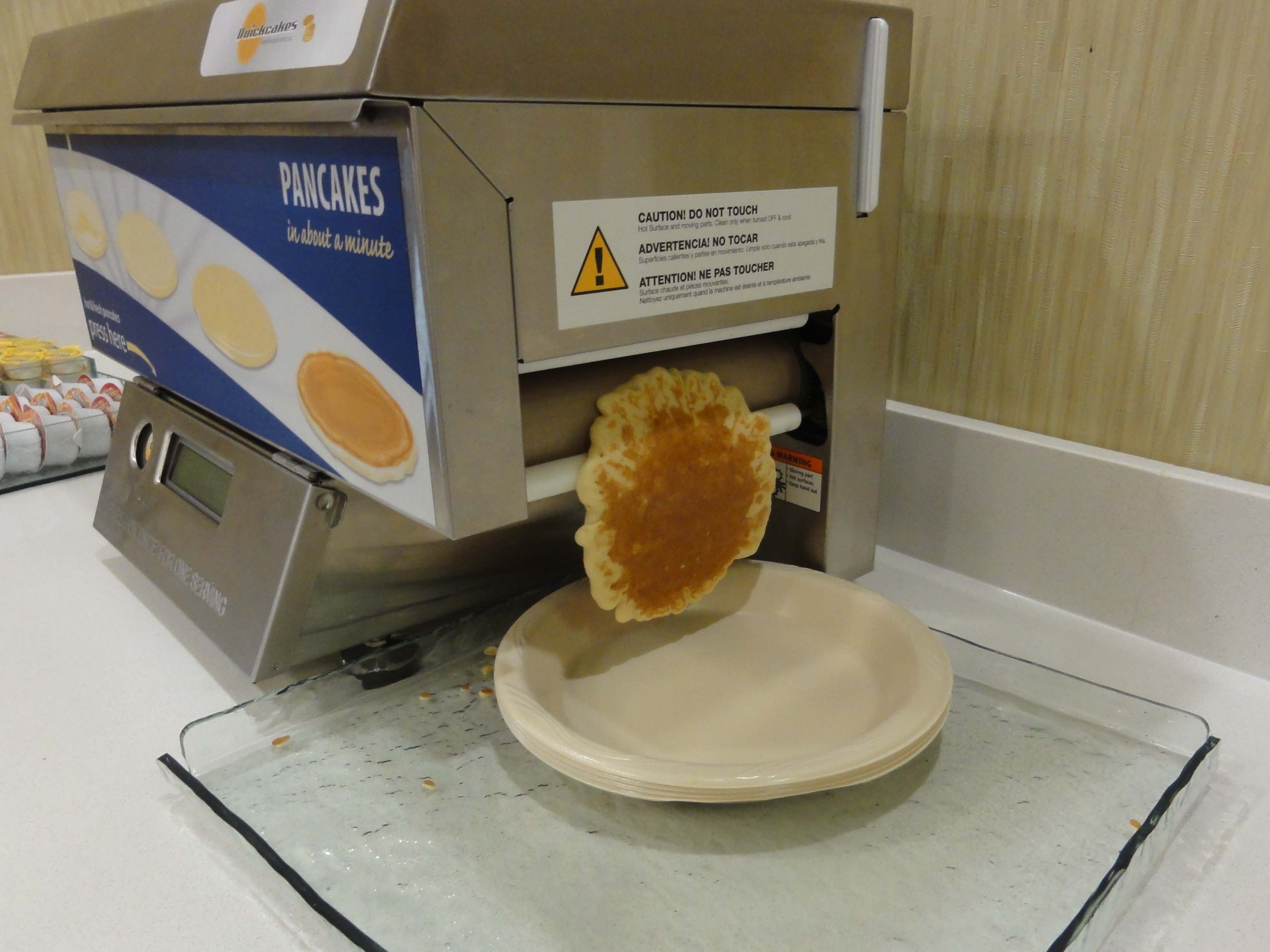 Pancake Machine